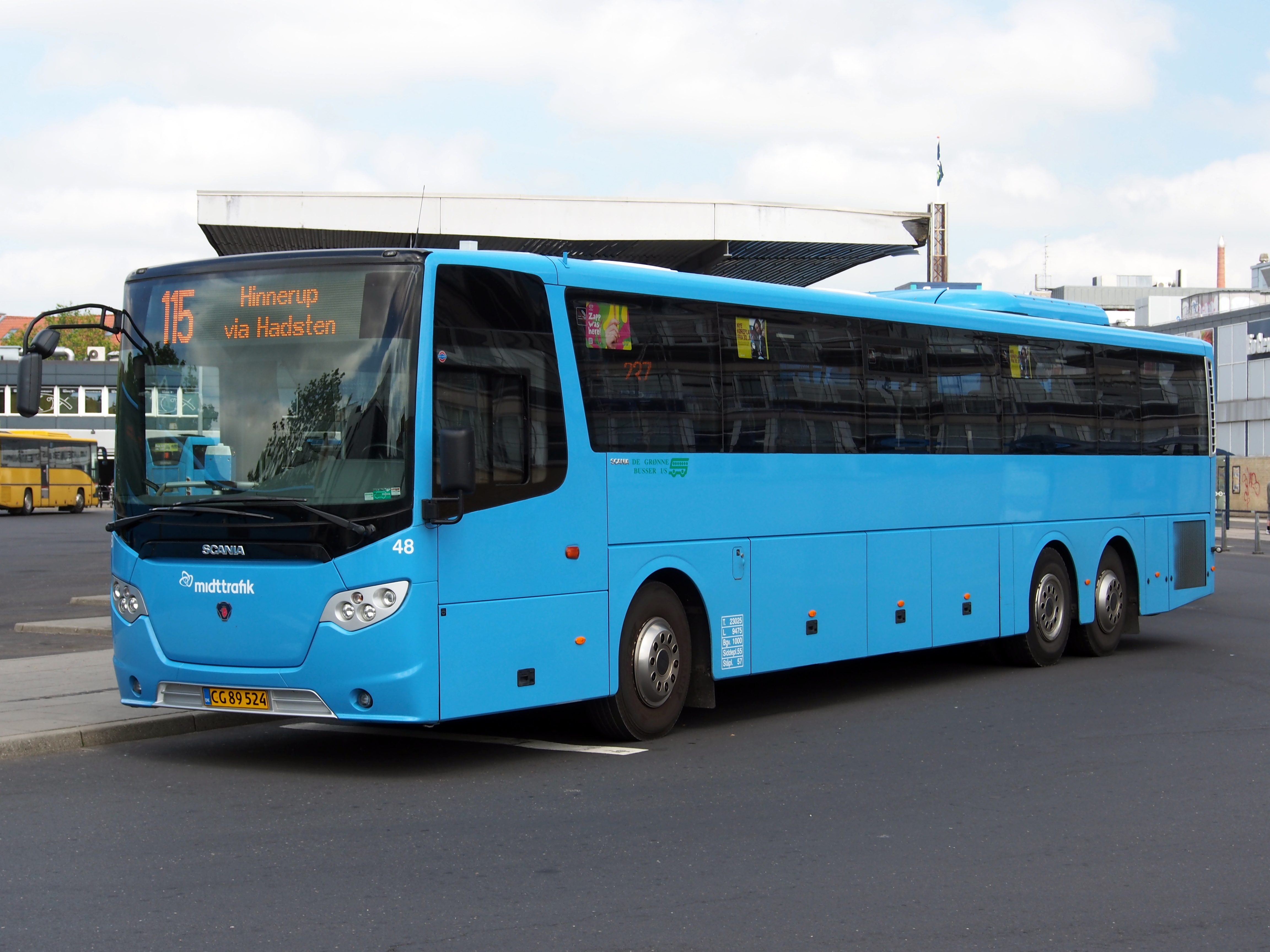 Photographed at Randers, Denmark.